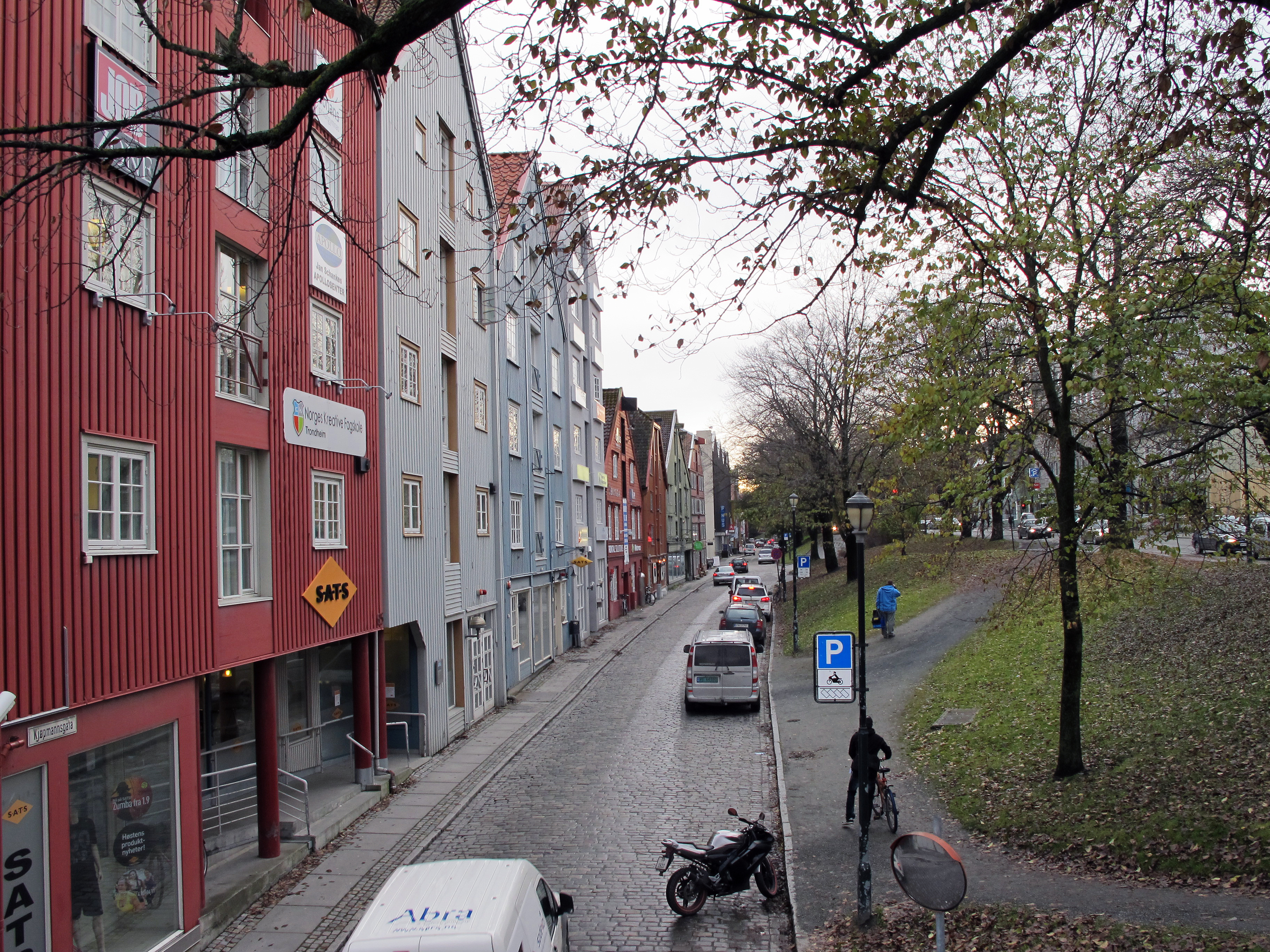 Bryggemiljø ved Trondheim elvehavn.